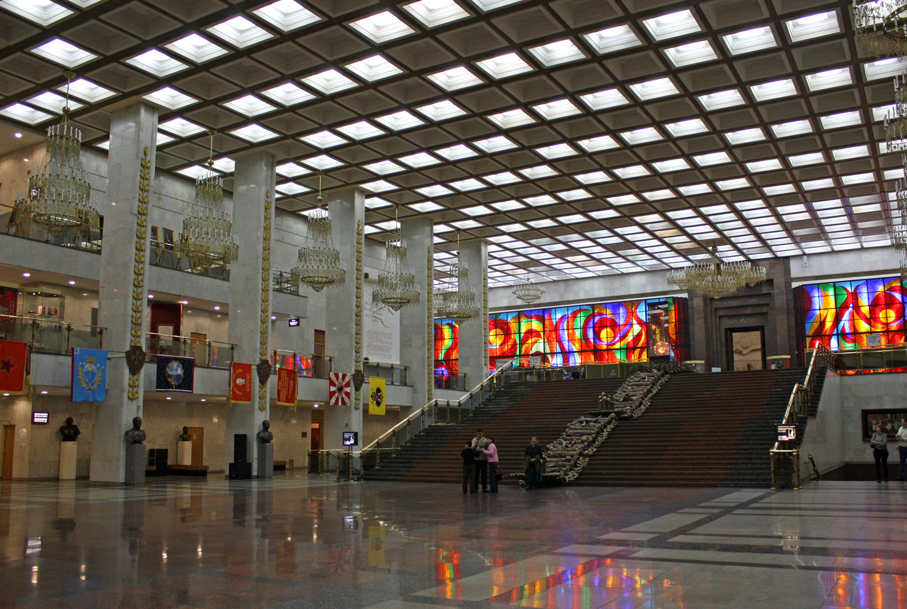 Центральный музей Великой Отечественной войны (Москва). Зал полководцев